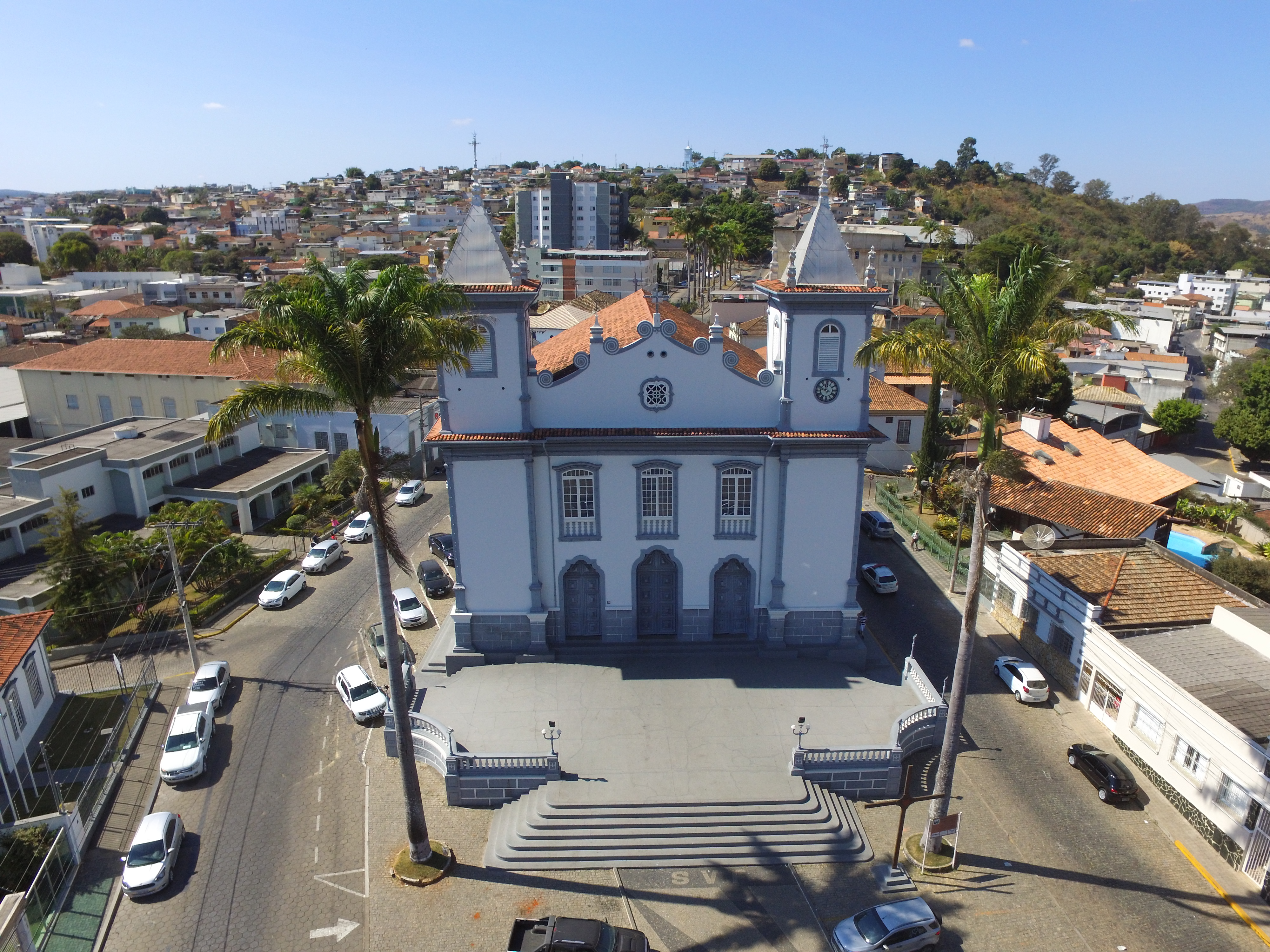 Igreja São Vicente Ferrer e seu entorno